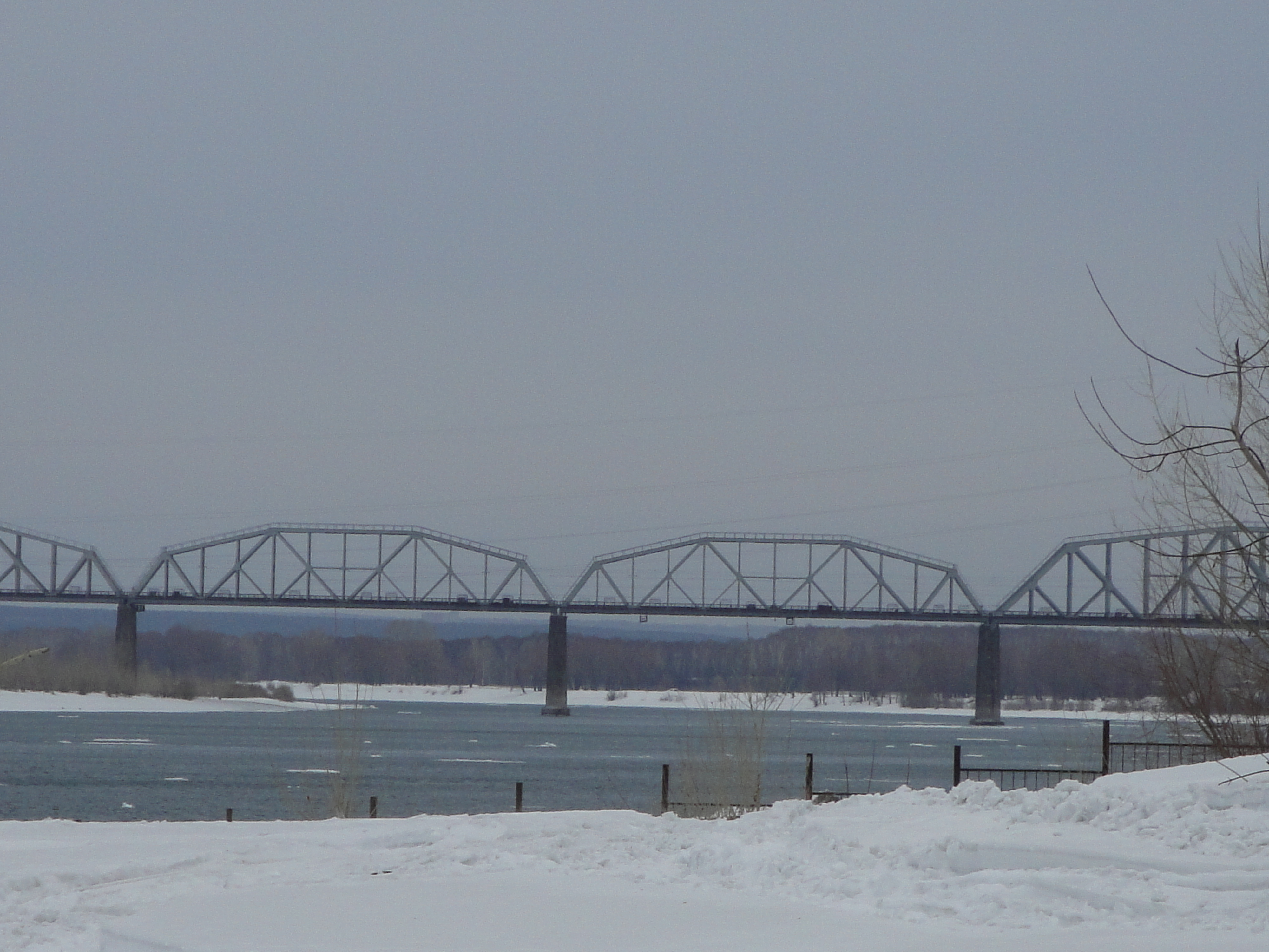 КИМовский железнодорожный мост через Обь - Новосибирск